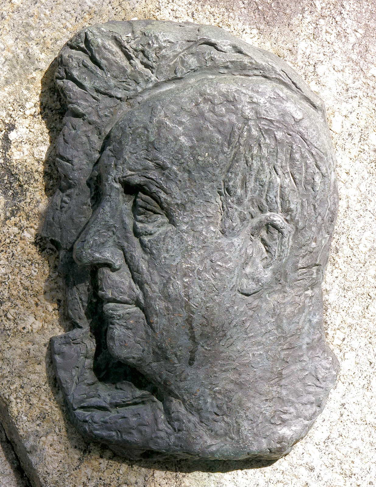 Imaxe de Ramón Cabanillas no pé dunha estatua en Cambados, Galicia, España Publish by= Luis Miguel Bugallo Sánchez. Self made.